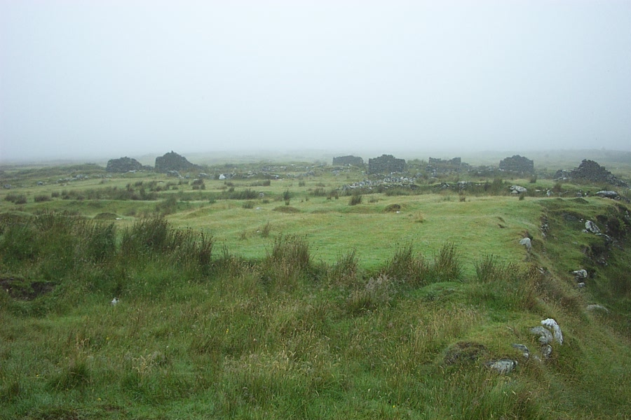 Desert Village sullo Slievemore, Achill Island.